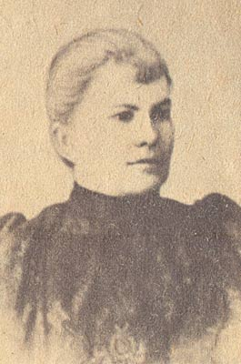 Вольга Епіфанаўна Сёмава – хросная маці Максіма Багдановіча, якая спрыяла яго знаёмству з Беларуссю, выпісала яму беларускія газеты “Наша доля” і “Наша ніва”.